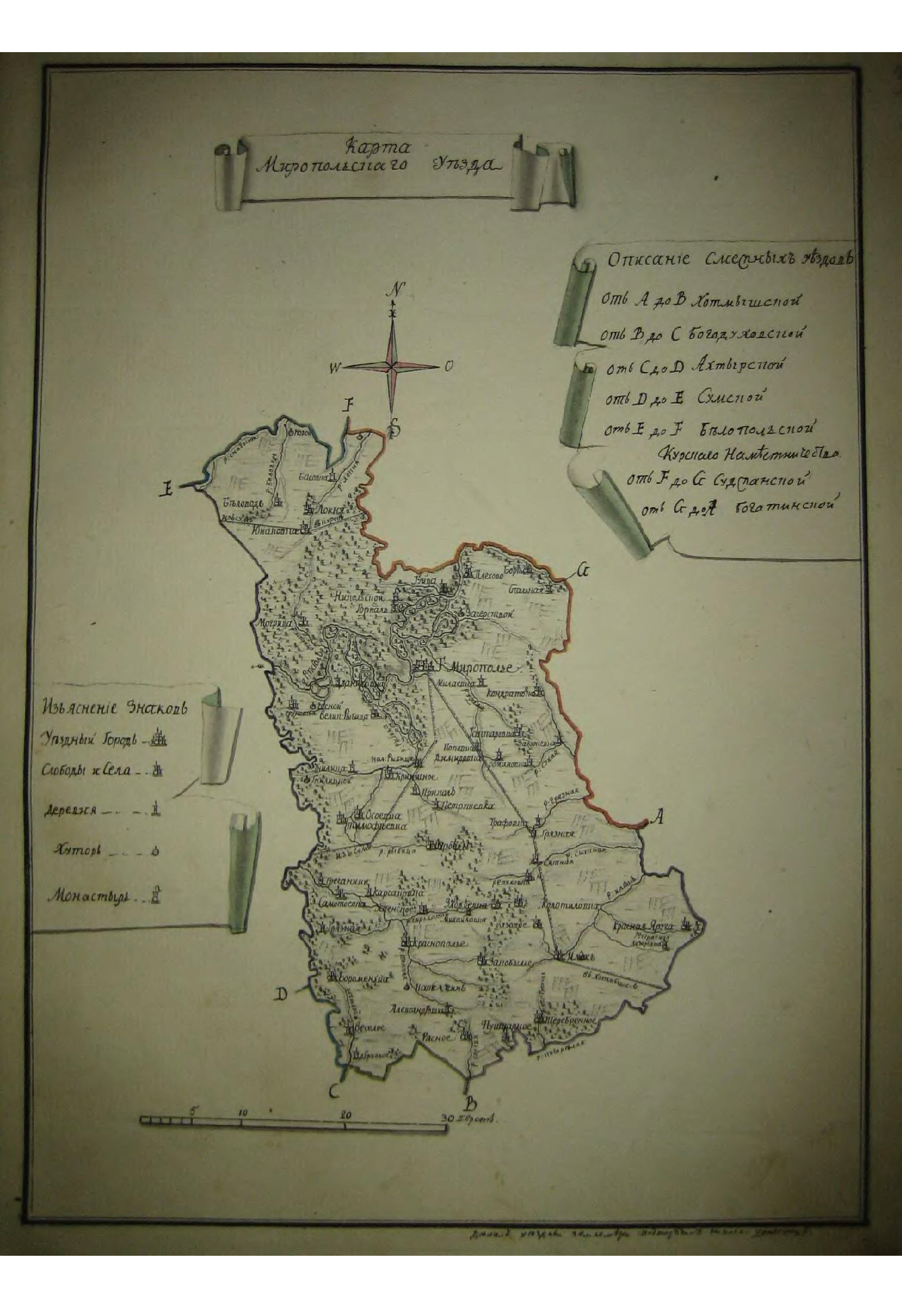 Харківське намісництво. Мапа Миропільського повіту з альбому мап намісництва. 1787 рік.